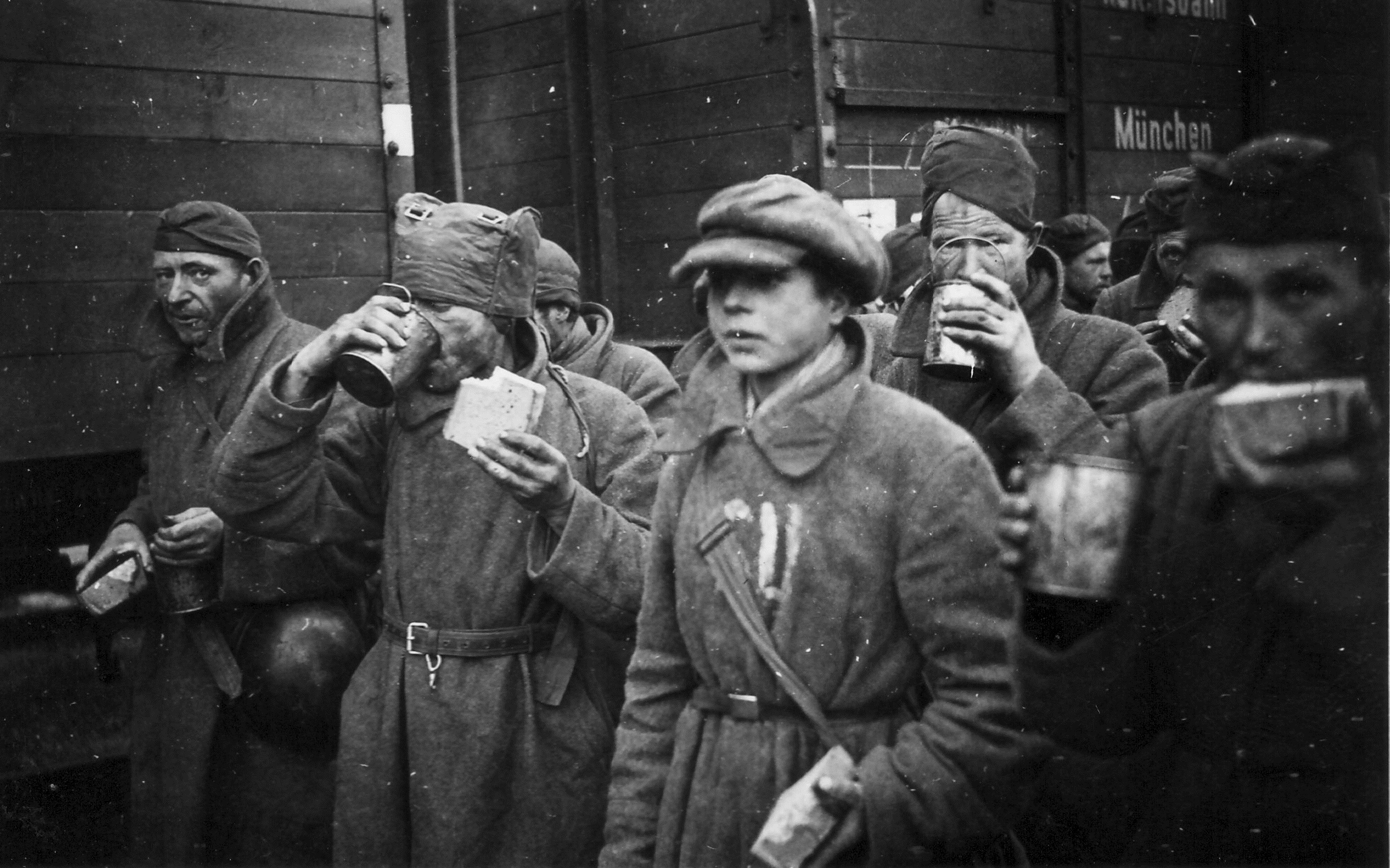 Sowjetische Kriegsgefangene aus dem Stalg II A bei der Ankunft und Verteilung zu den Arbeitsorten.